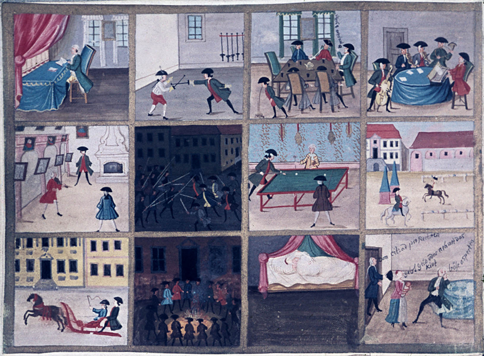 Studentenleben aus dem Stammbuch Serre